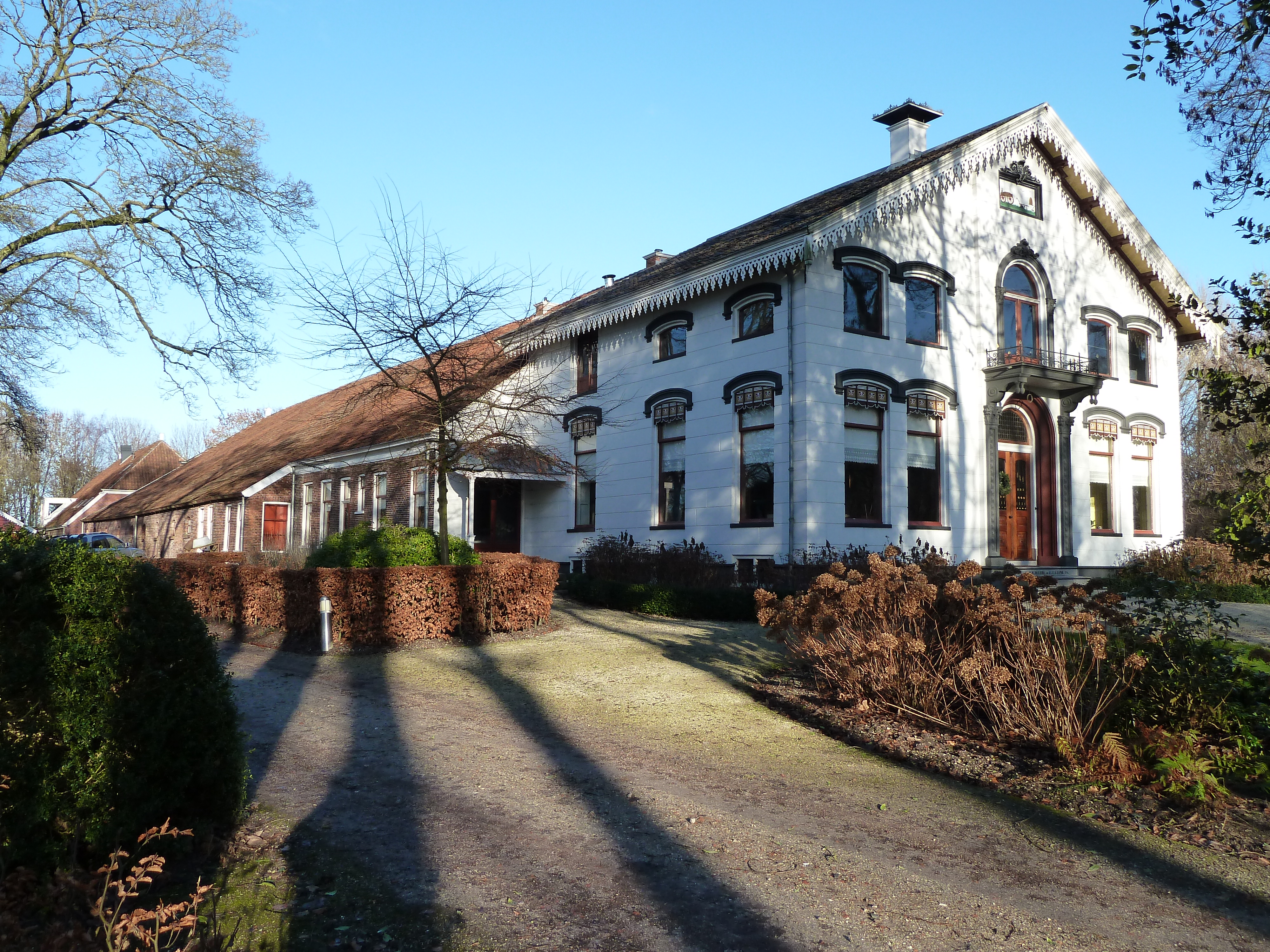 Boerderij Hermans Dijkstra aan de Reinste Abdenaweg 1 van Midwolda (Groningen, Nederland).